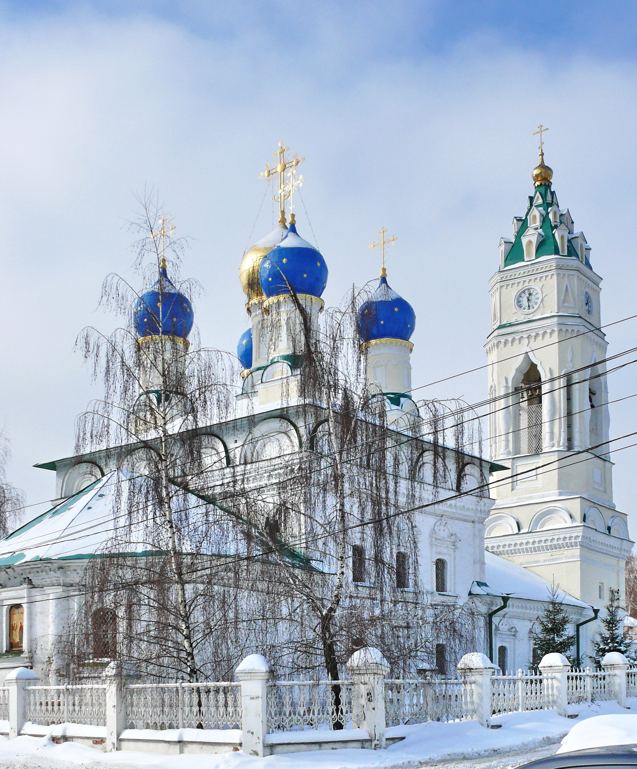 Церковь Благовещения (Тульская область, Тула, Благовещенская улица, 4 (лит. А))